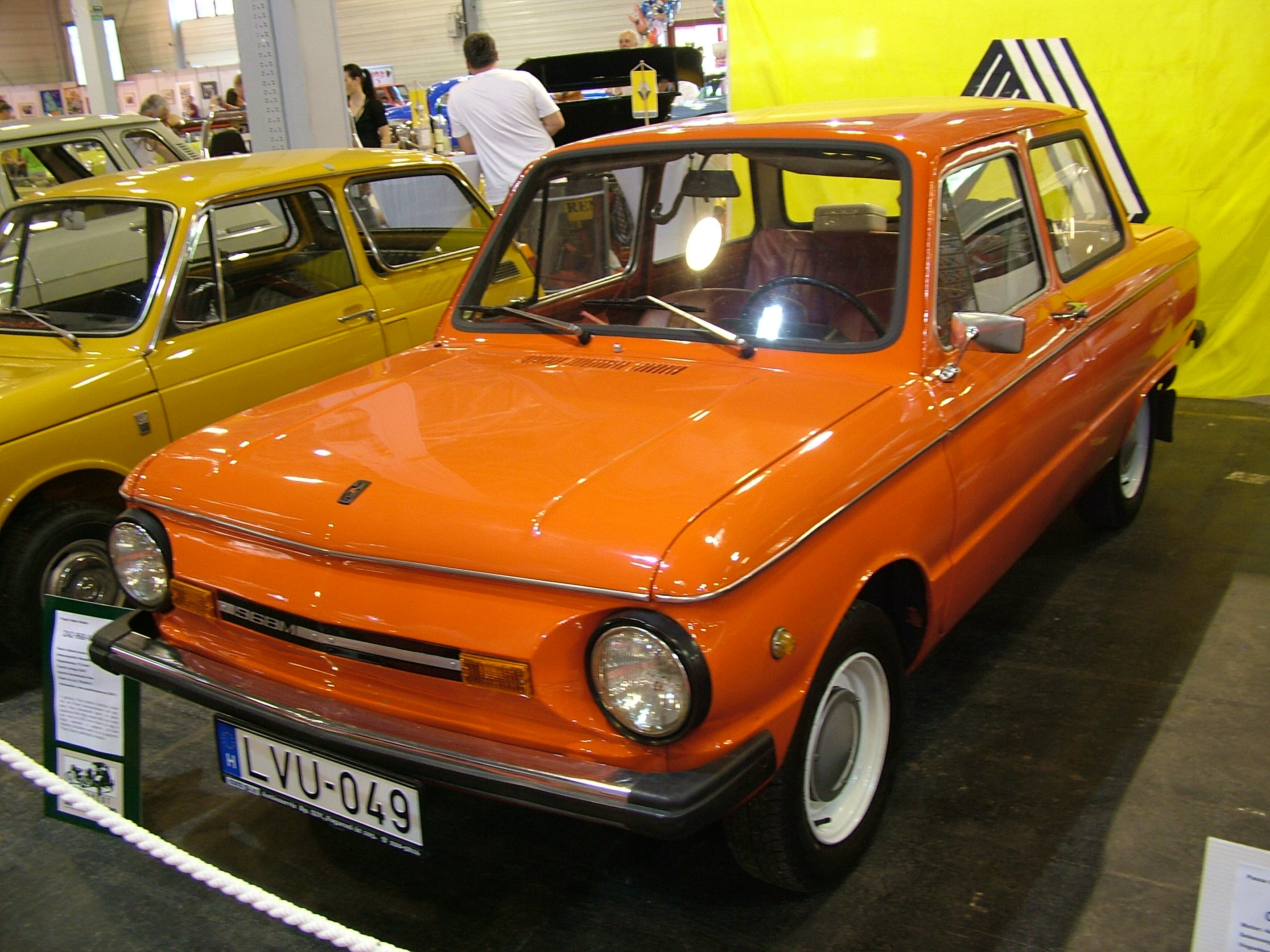 Zaporoshets ZAZ-986-M, 1979